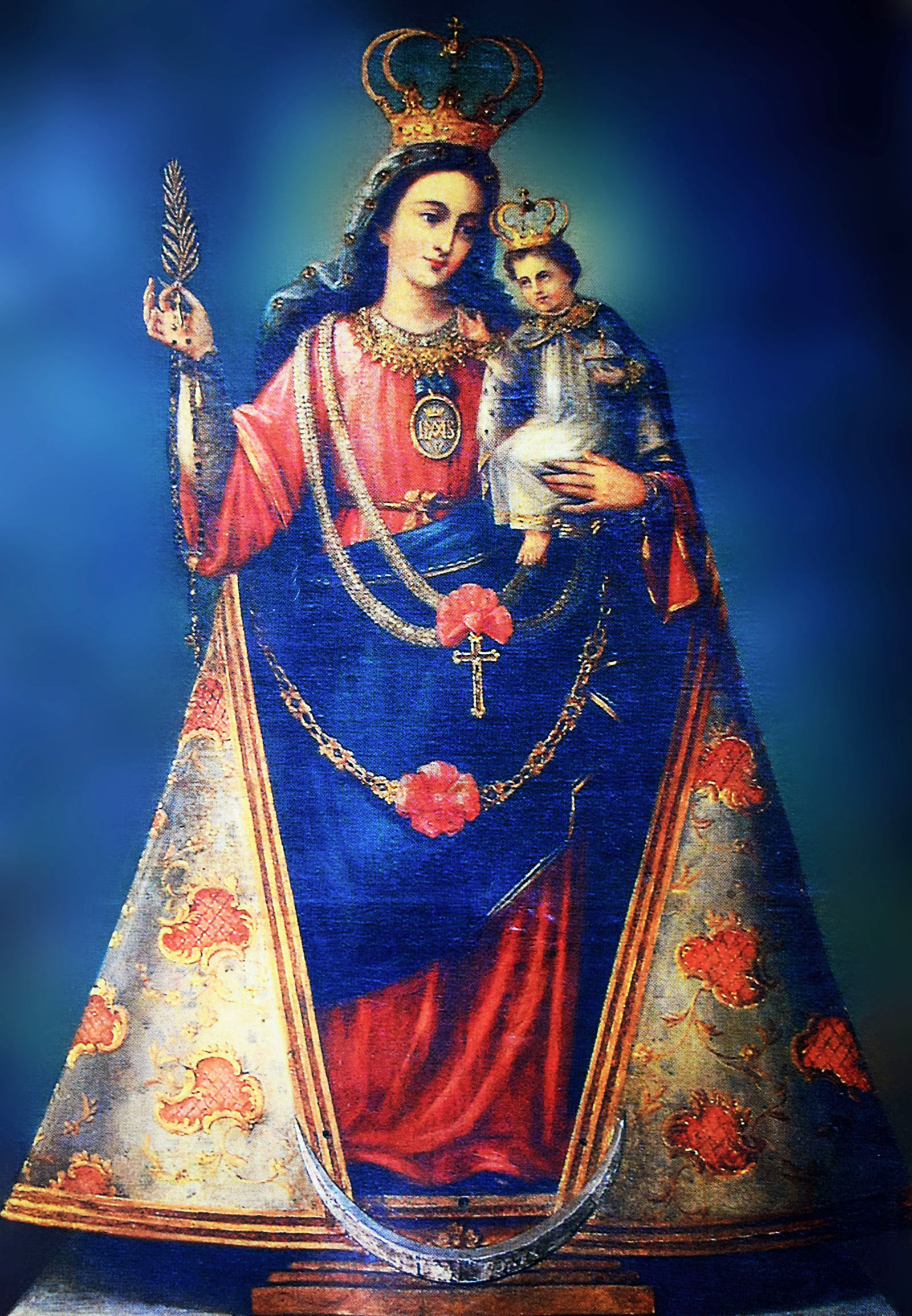 Nuestra Señora del Rosario del Palmar, patrona de la ciudad de Palmira